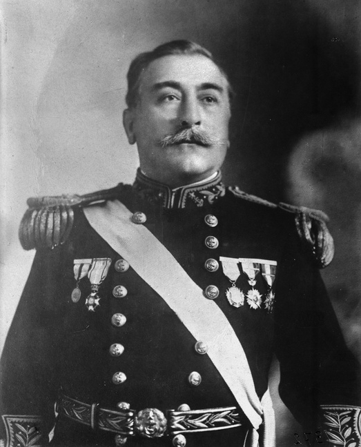 Arturo Fernández Vial (Santiago, 15 de marzo de 1858 - † Santiago, noviembre de 1931) Marino Chileno. Guardiamarina de la corbeta Esmeralda en el Combate naval de Iquique del 21 de mayo de 1879. Participó en la Guerra del Pacífico y en la Guerra Civil de 1891.